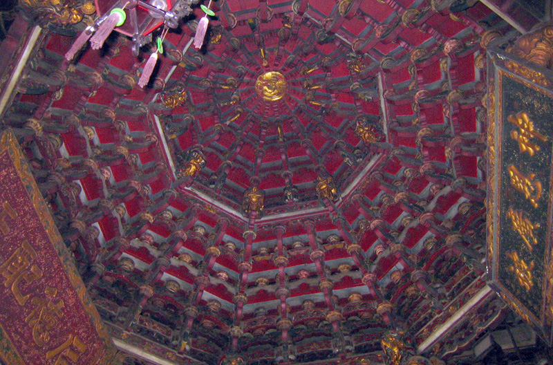 南瑤宮三川殿藻井